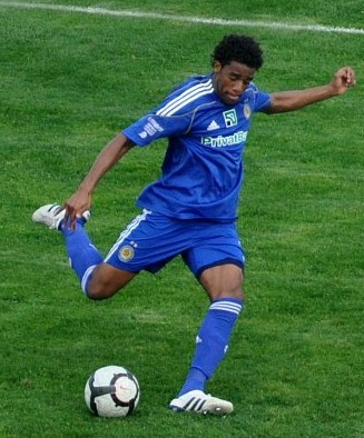 Бетао — бразильский футболист.